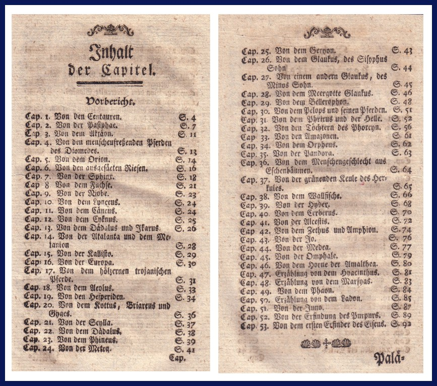 INHALTSVERZEICHNIS aus: Johann Heinrich Friedrich Meineke, „Palaephatus von unglaublichen Begebenheiten“. Quedlinburg bey Christoph August Reußner, 1774 (gemeinfrei)